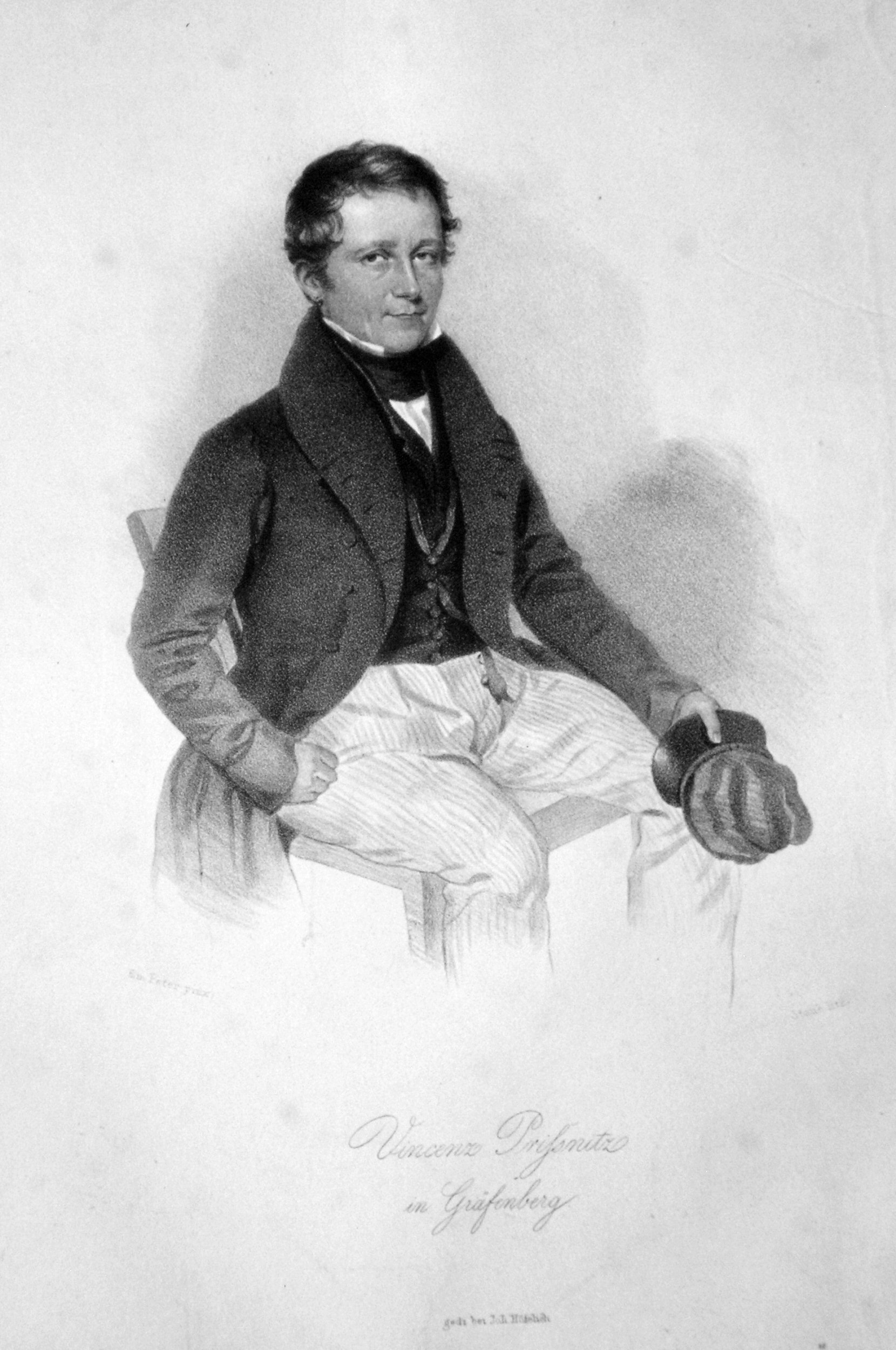 Vincenz Priessnitz (1799-1851), Pionier der Hydrotherapie. Lithographie.